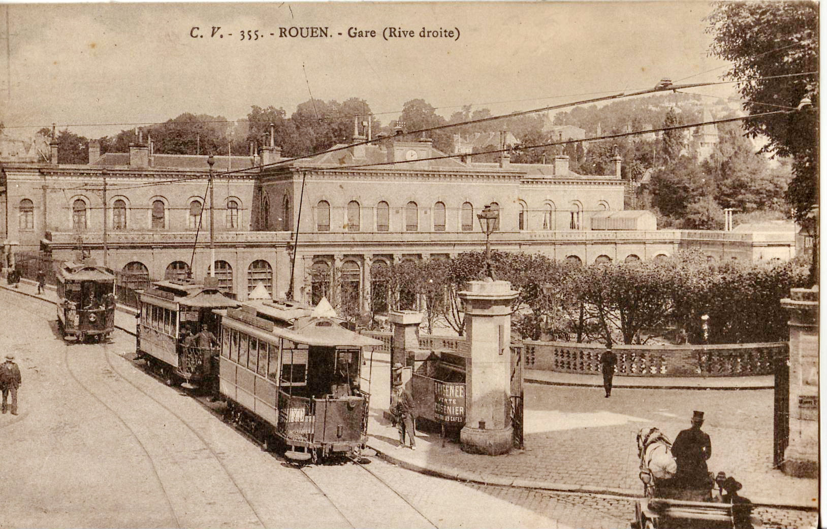 Carte postale ancienne éditée par C. V. n°355 Rouen - Gare (Rive droite) Vue en gros plan de motrices de l'ancien tramway de Rouen sur un évitement.